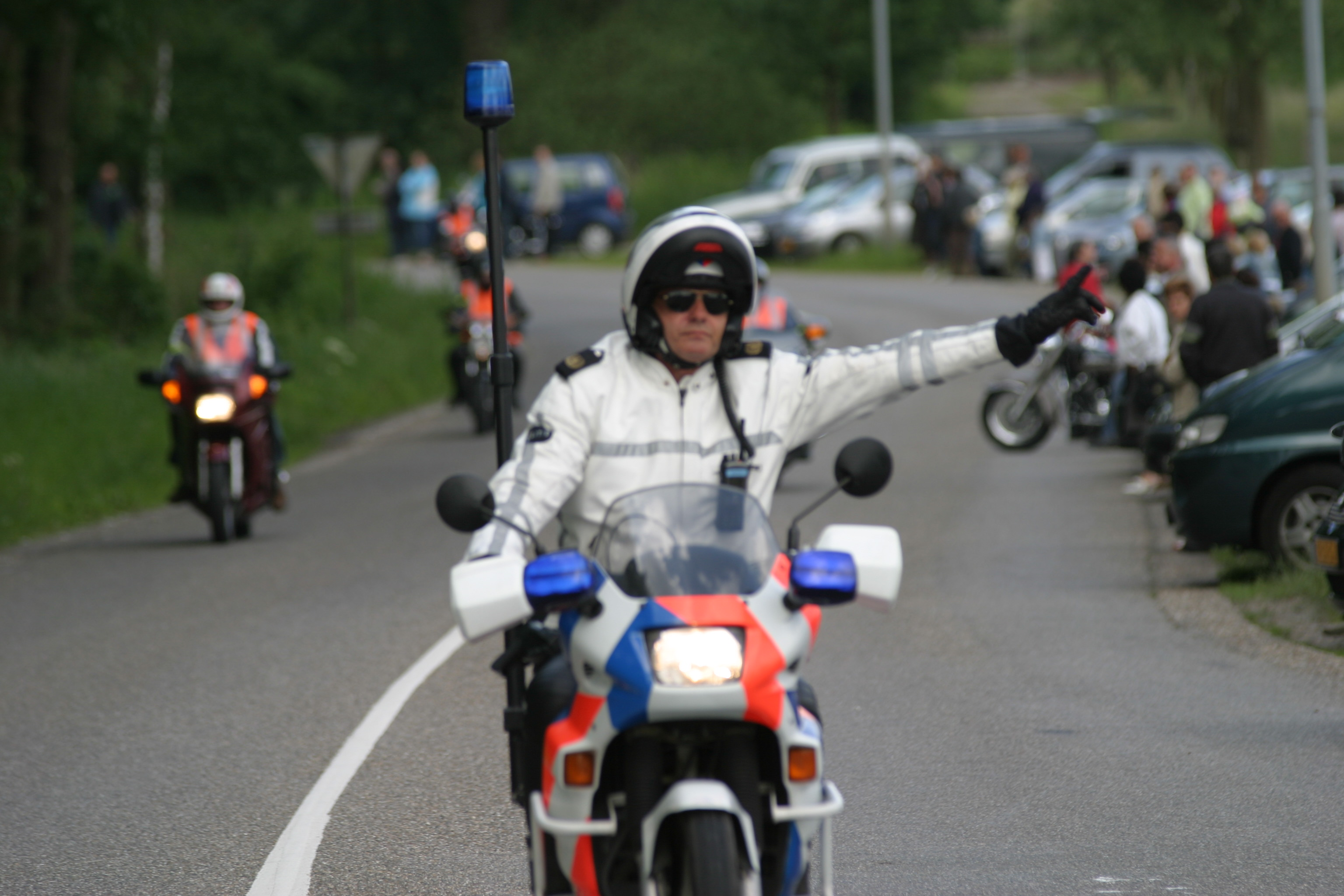 Eigen werk. Publiek domein.